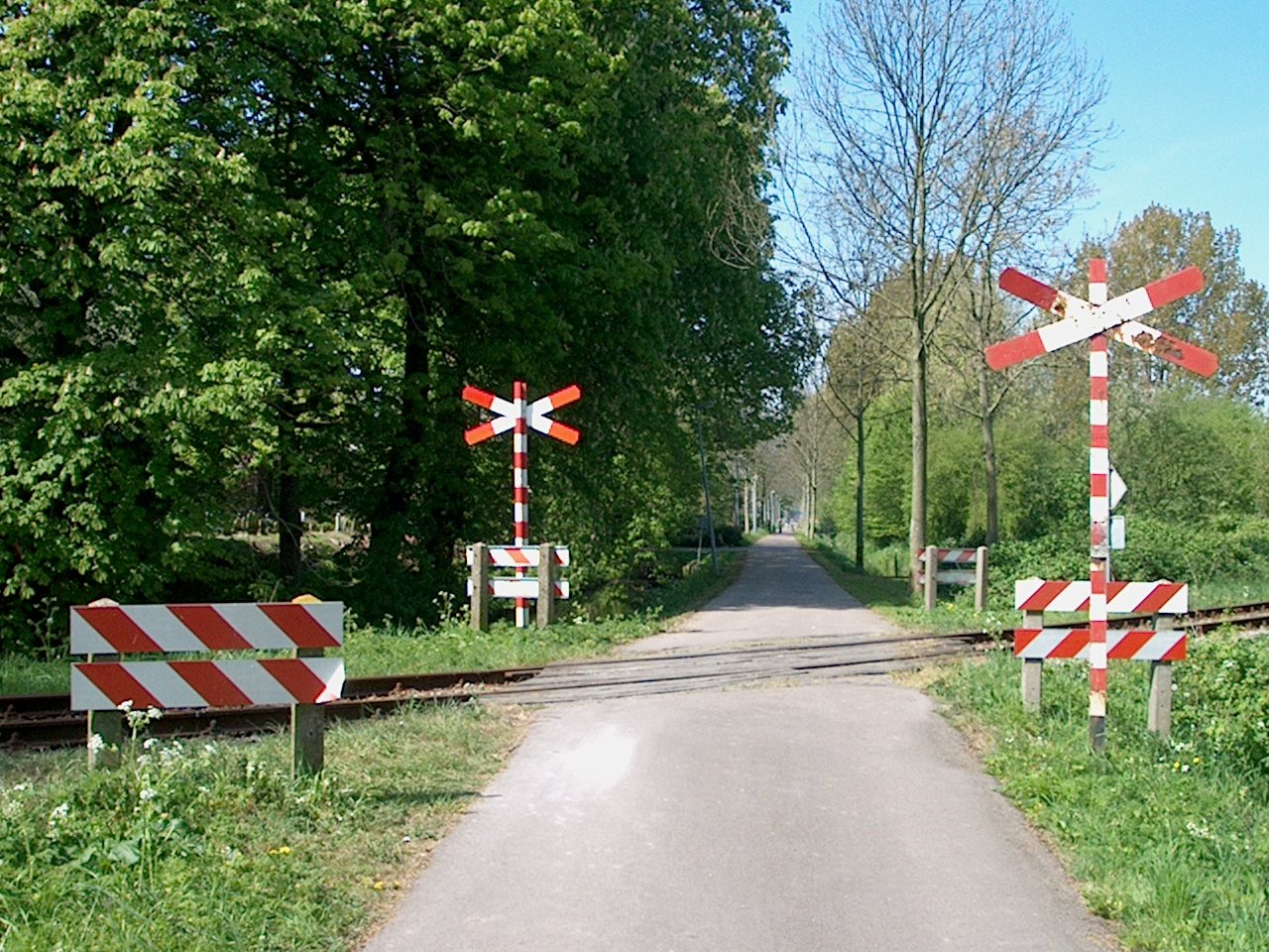 Onbeveiligde spoorwegovergang, Holenweg, Hoorn (Noord-Holland), Nederland